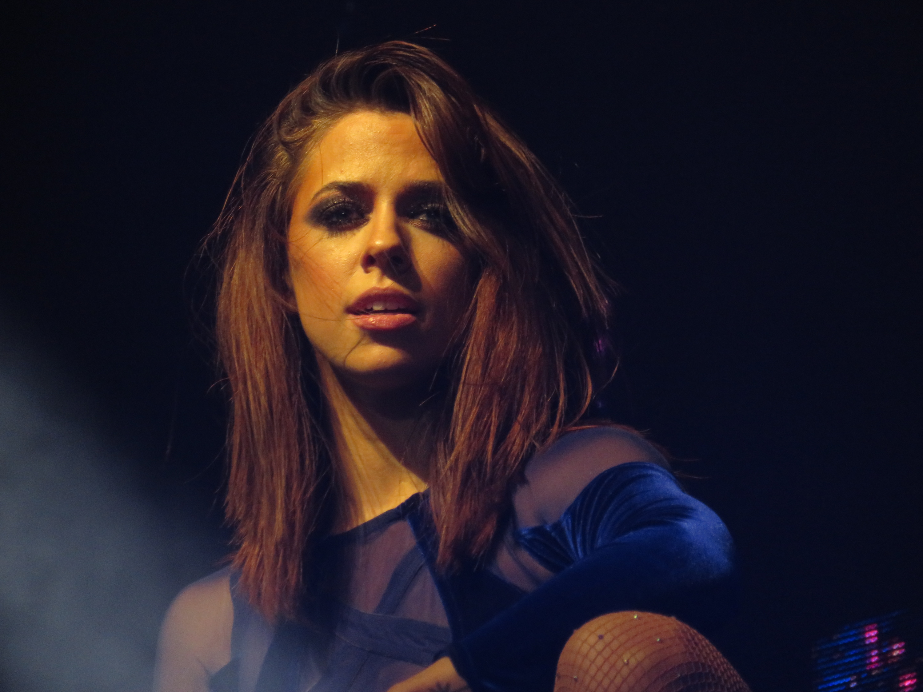 Vanessa Mai, 2018-05-14, Circus-Krone-Bau, München